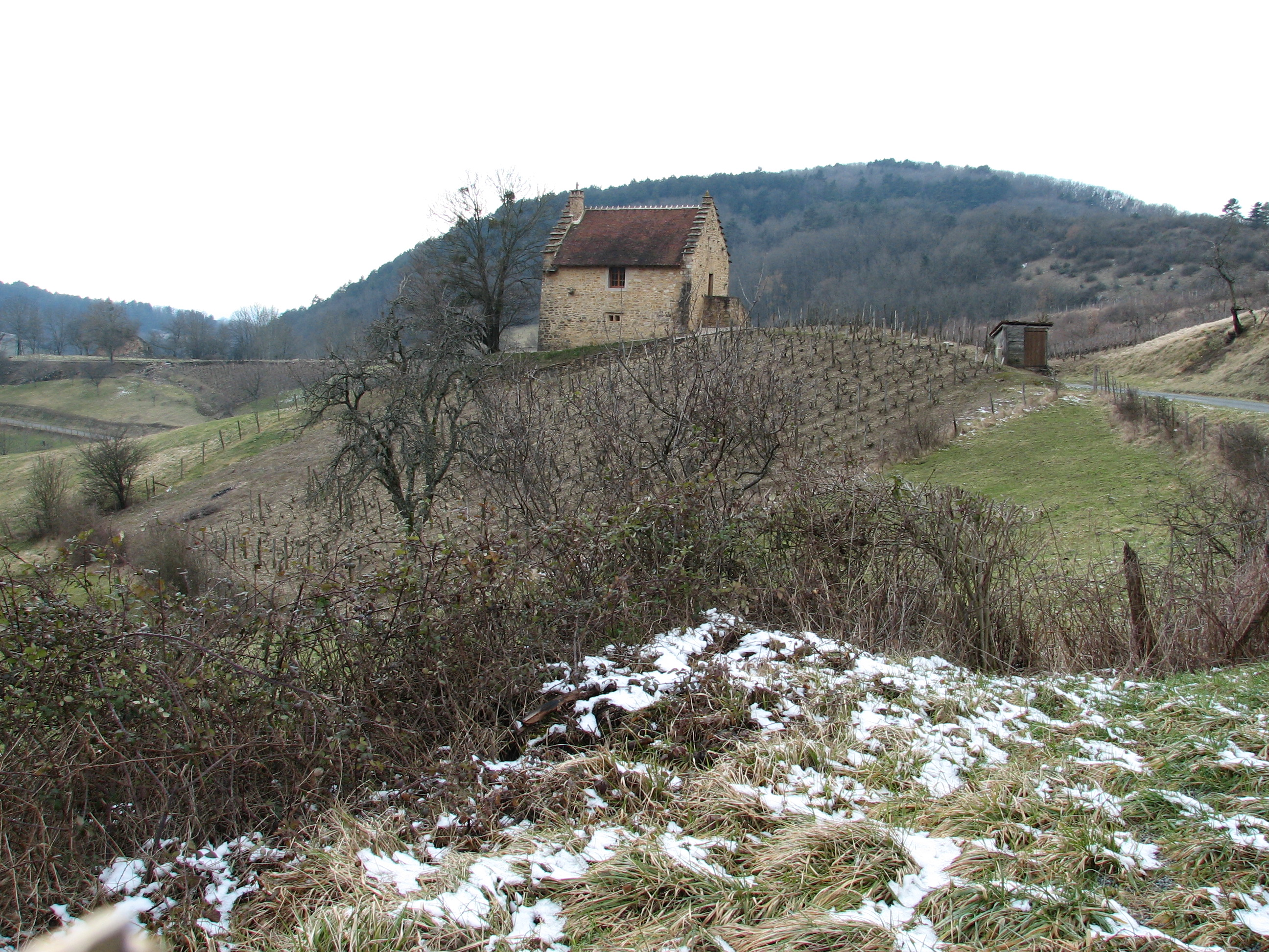 Gizia_ancien_pressoir